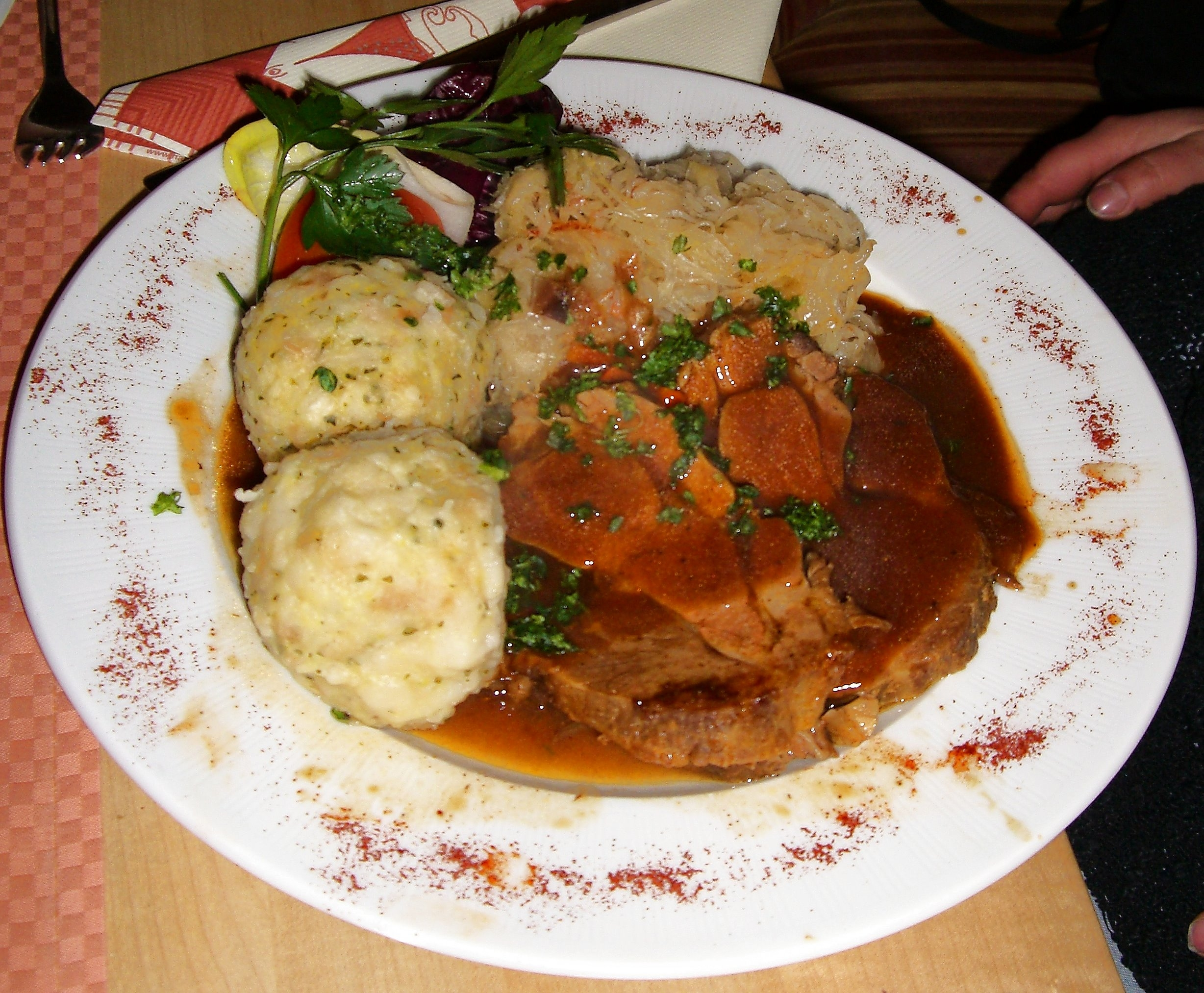 Stammtisch Nordhessen November 08 - lecker Essen